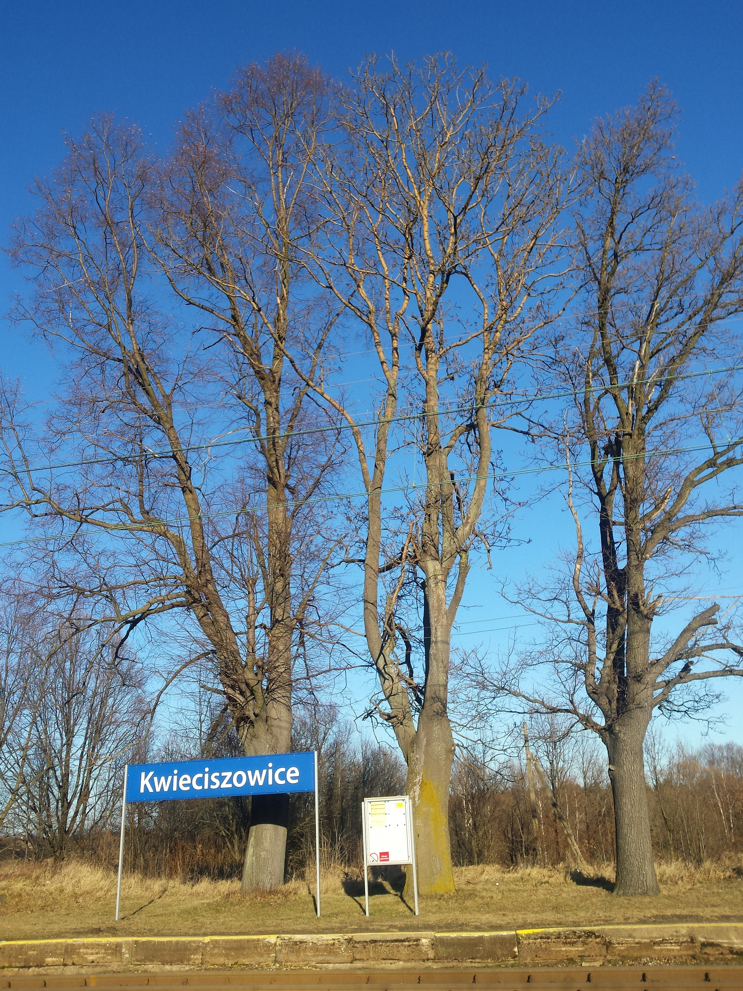 Tablica z nazwą przystanku na stacji kolejowej Kwieciszowice.